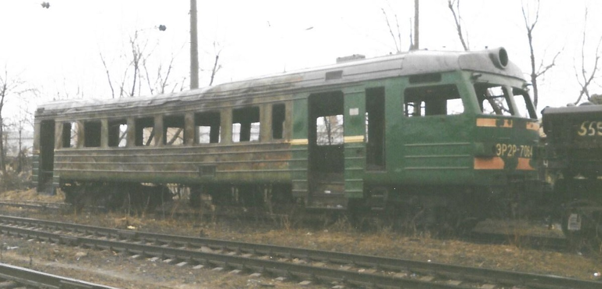 Электропоезд построен в 12-вагонной составности С завода поступил в депо Перерва Московской ж. д; 05.1998 — передан в депо Лобня Московской ж. д.; 03.2015 — расформирован. Вагон 01 сгорел до степени исключения из инвентаря 30.04.1993, списан и разрезан в 2000 г., вместо него закреплён вагон 306501; Вагон 02 сгорел 30.04.1993, восстановлен на Даугавпилсском ЛРЗ; Вагон 03 с 1994 по 1997 г. работал в сборном составе ЭД2Т-0004, в 2009 году передан в депо имени Ильича, работал в составе ЭР2Т-7100 под номером 710011, вместо него закреплён вагон ЭД2Т-000307; Вагон 04 сгорел 21.04.1994 в сборном составе ЭД2Т-0004; восстановлен на Даугавпилсском ЛРЗ, не запущен в эксплуатацию, на 2013 г. находился на территории депо Перерва, вместо него закреплён вагон 306502; Вагон 09 04.2015 передан в депо Апрелевка, закреплён в составе ЭР2Т-7213 вместо сгоревшего вагона 721309, 03.2017 вместе с составом ЭР2Т-7213 возвращен в депо Лобня. КР Даугавпилсский ЛРЗ 10.2002 г.; КР-1 Московский ЛРЗ 06.2013 г.